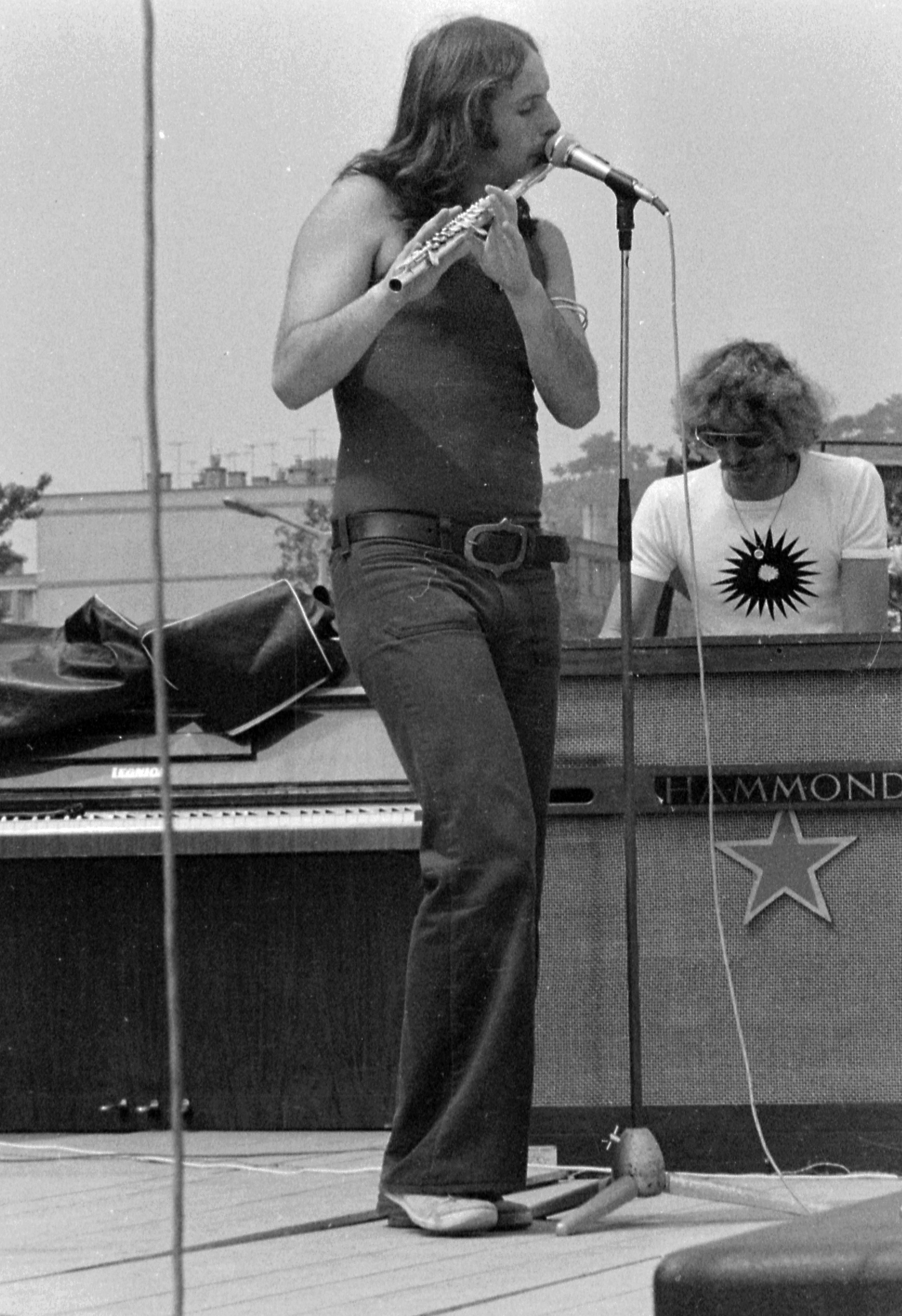 DVTK stadion, Rockfesztivál. Török Ádám és Papp Gyula (Mini együttes). Location: Hungary Tags: stage, celebrity, musical instrument, flute, organ Title: DVTK stadion, Rockfesztivál. Török Ádám és Papp Gyula (Mini együttes).